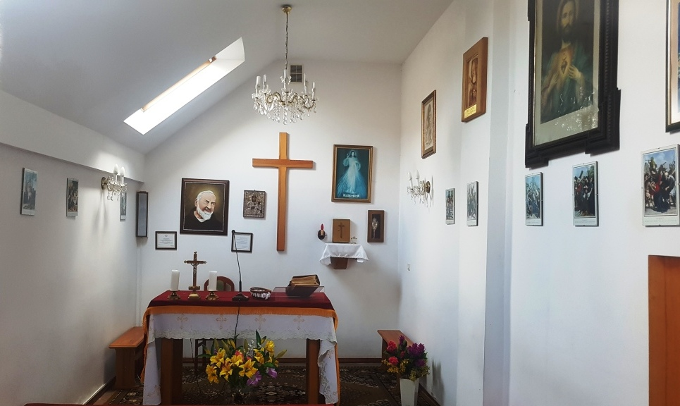 Narusa kaplica relikwie św. Ojca Pio